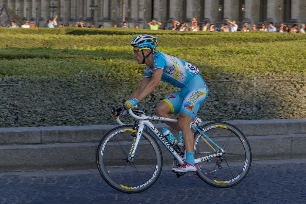 Enrico Gasparotto durant le Tour de France 2013